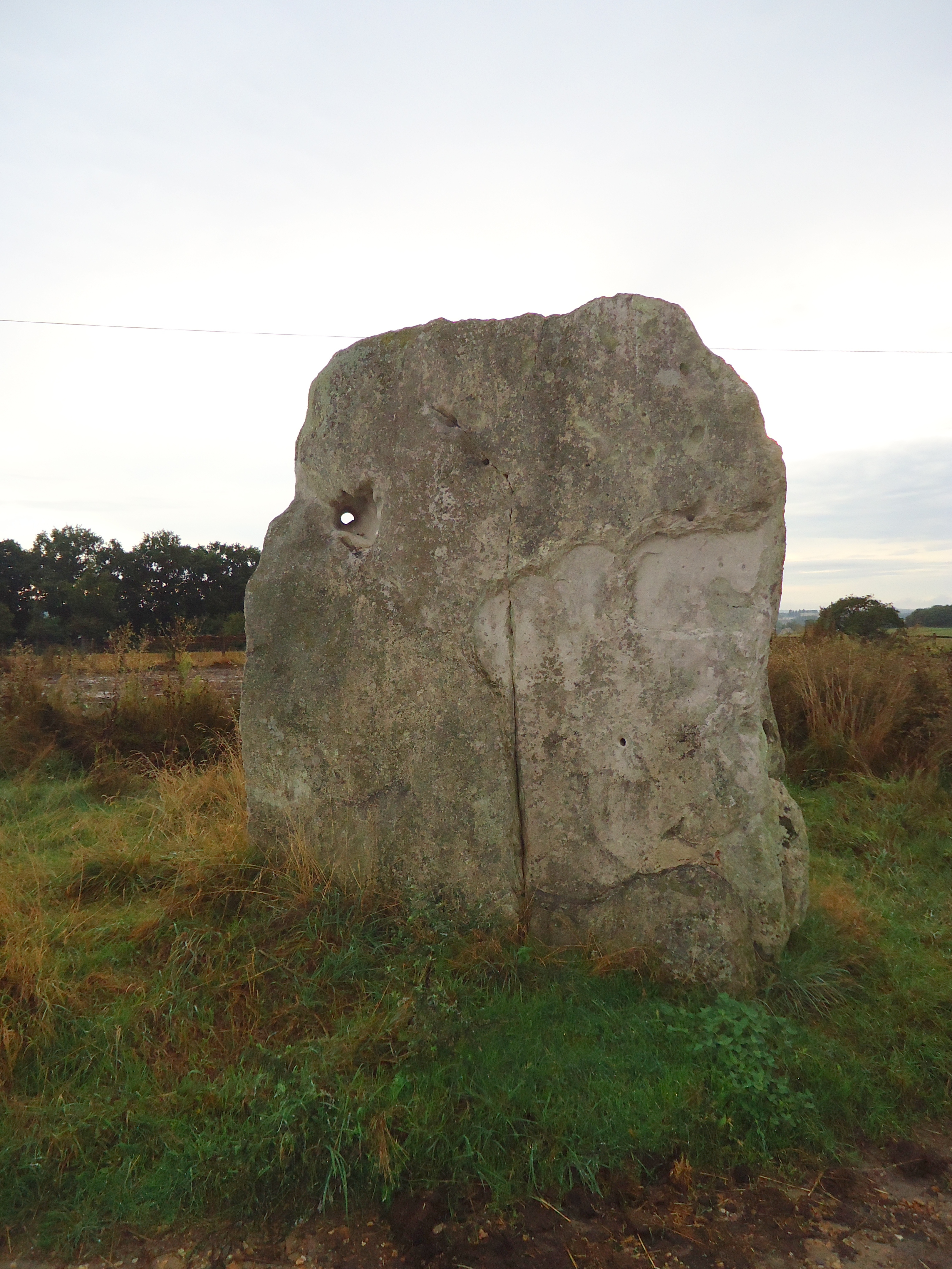 Menhir de la pierre Fiche - Duneau - Sarthe (72)